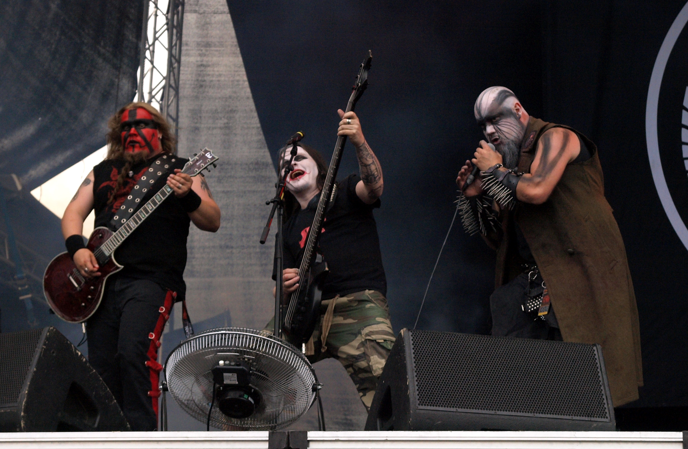 Turmion Kätilöt live am Myötätuulirock 2011